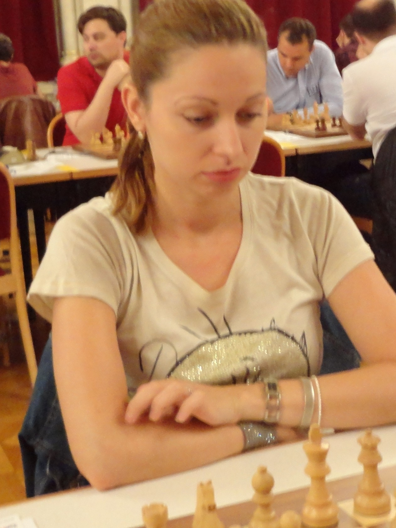 Regina Theissl-Pokorná, Vienna Chess Open 2015 in Wien.